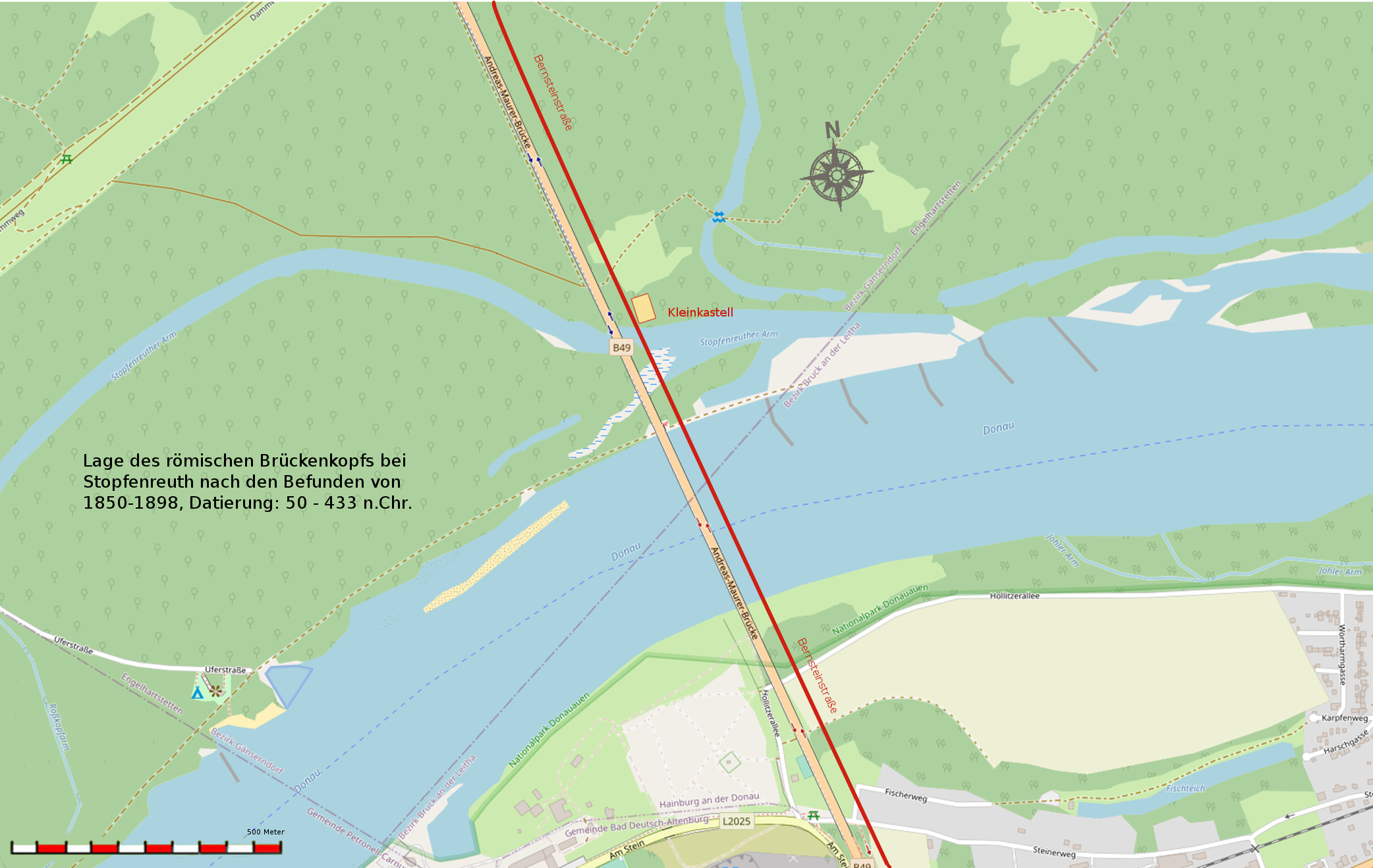 Lageskizze des römischen Brückenkopfkastells und Verlauf der Bernsteinstraße bei Stopfenreuth (A).